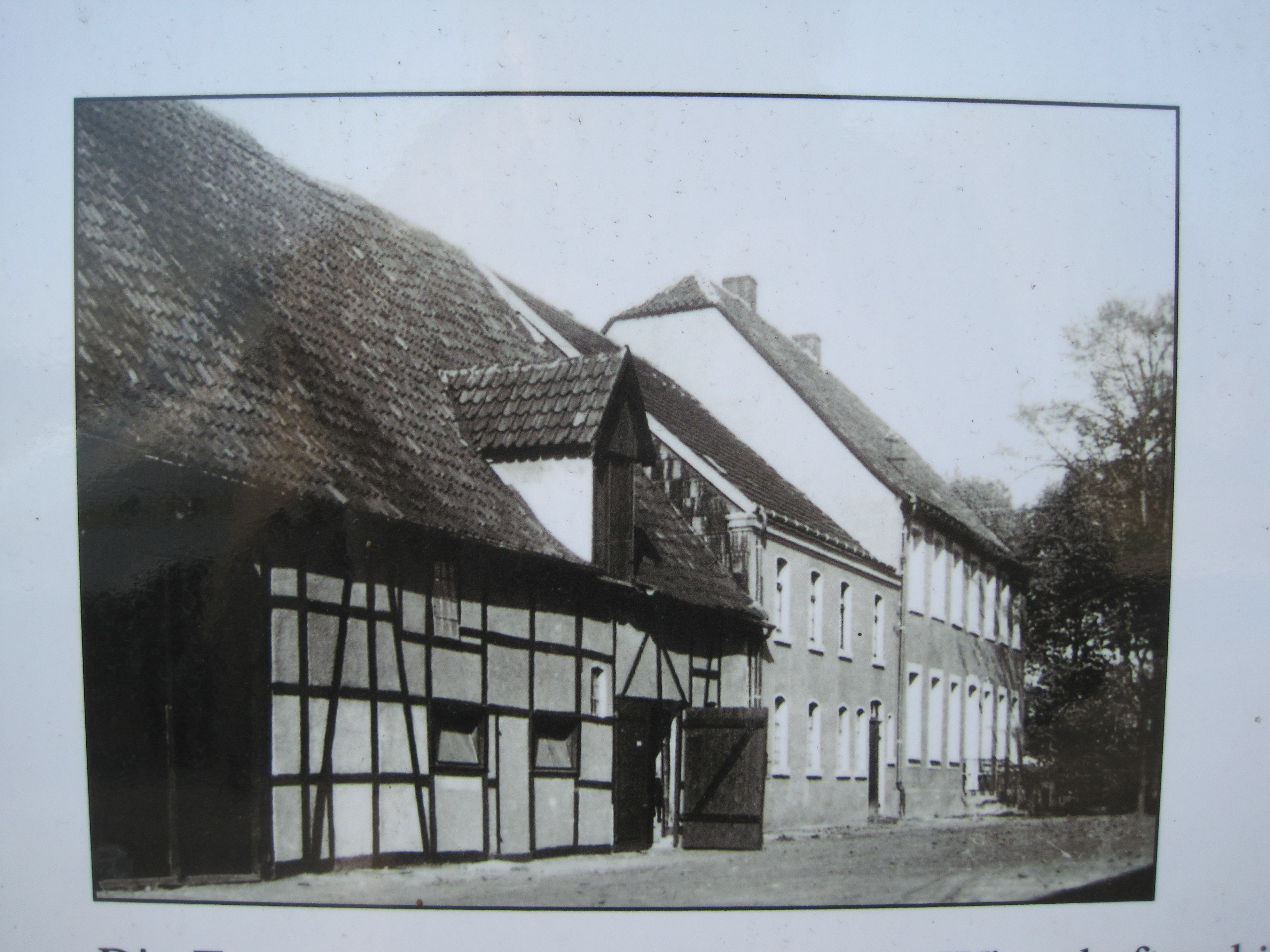 Das Foto zeigt einen Teilbereich einer Informationstafel auf dem Burghügel Mark zu Hamm.